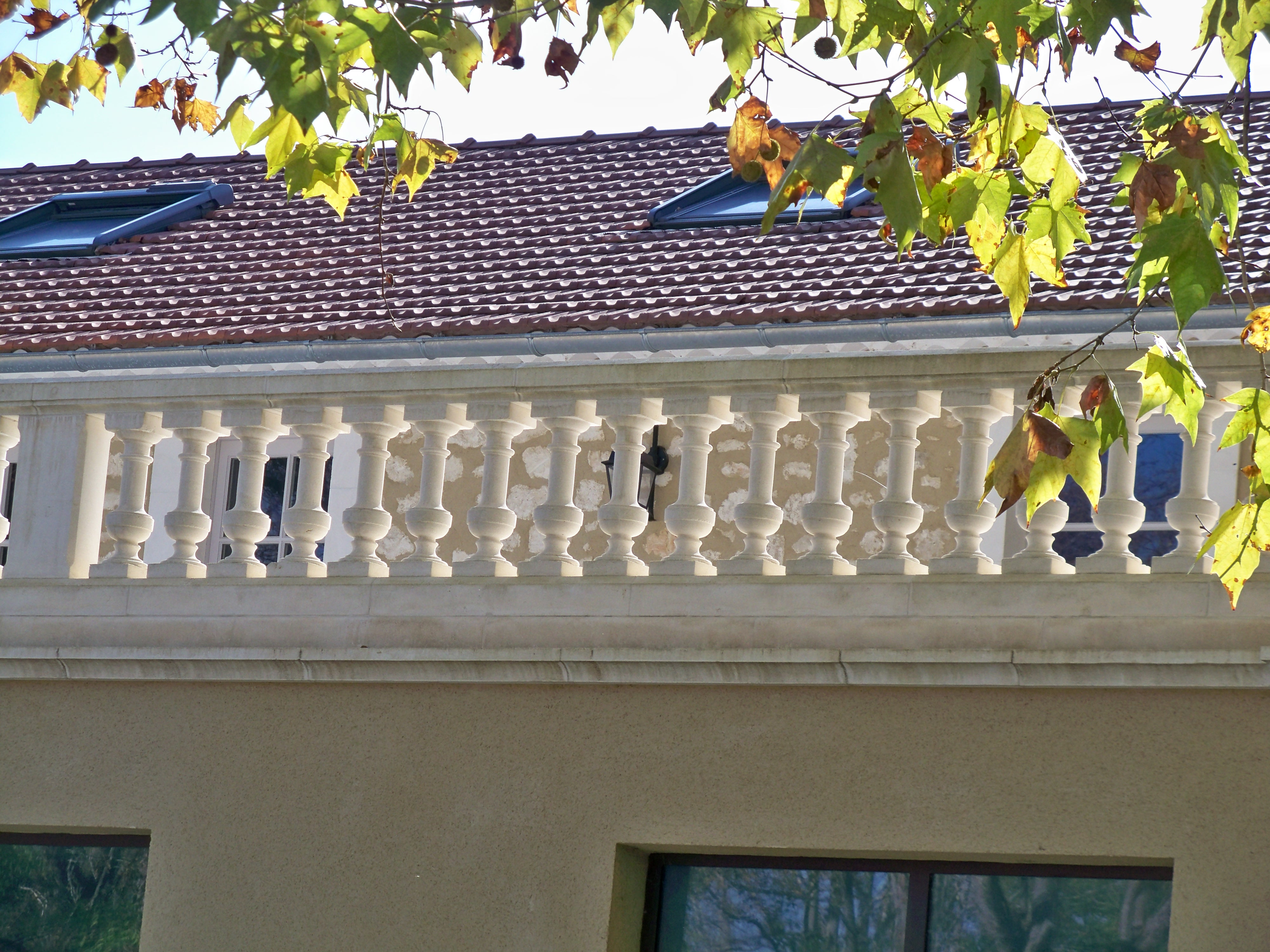 balustres de l'espace de la gare